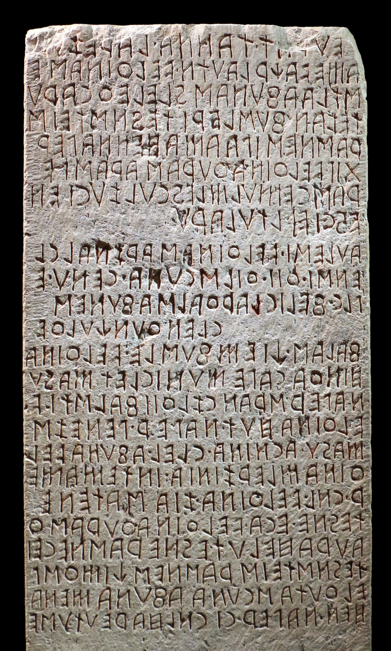 Museo Archeologico Nazionale dell'Umbria